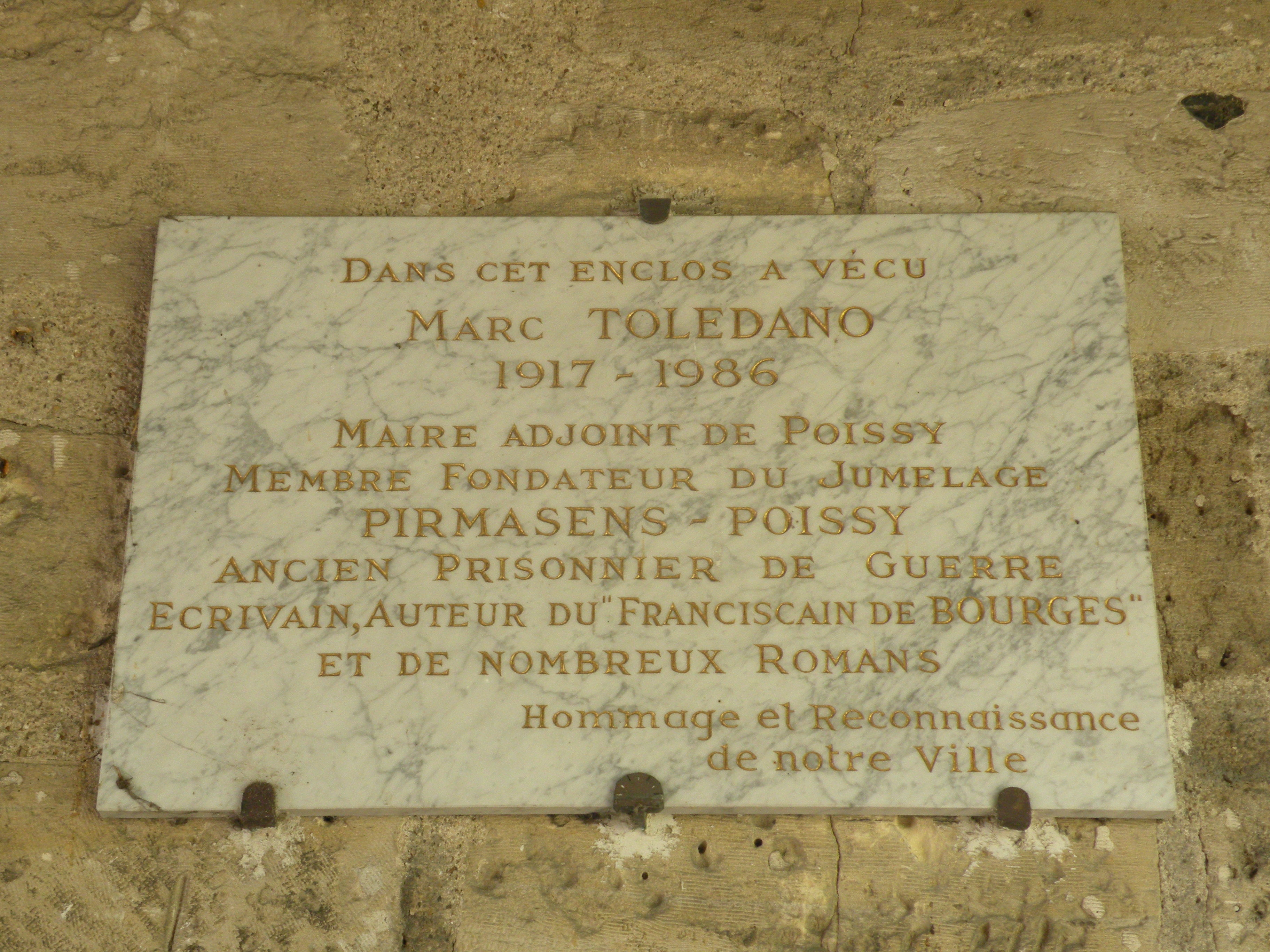 Prieuré Saint-Louis de Poissy plaque commémorative : Dans cet enclos a vécu Marc Toledano 1917 - 1986 maire adjoint de Poissy membre fondateur du jumelage Pirmasens - Poissy ancien prisonnier de guerre écrivain, auteur du "Franciscain de Bourges" et de nombreux romans